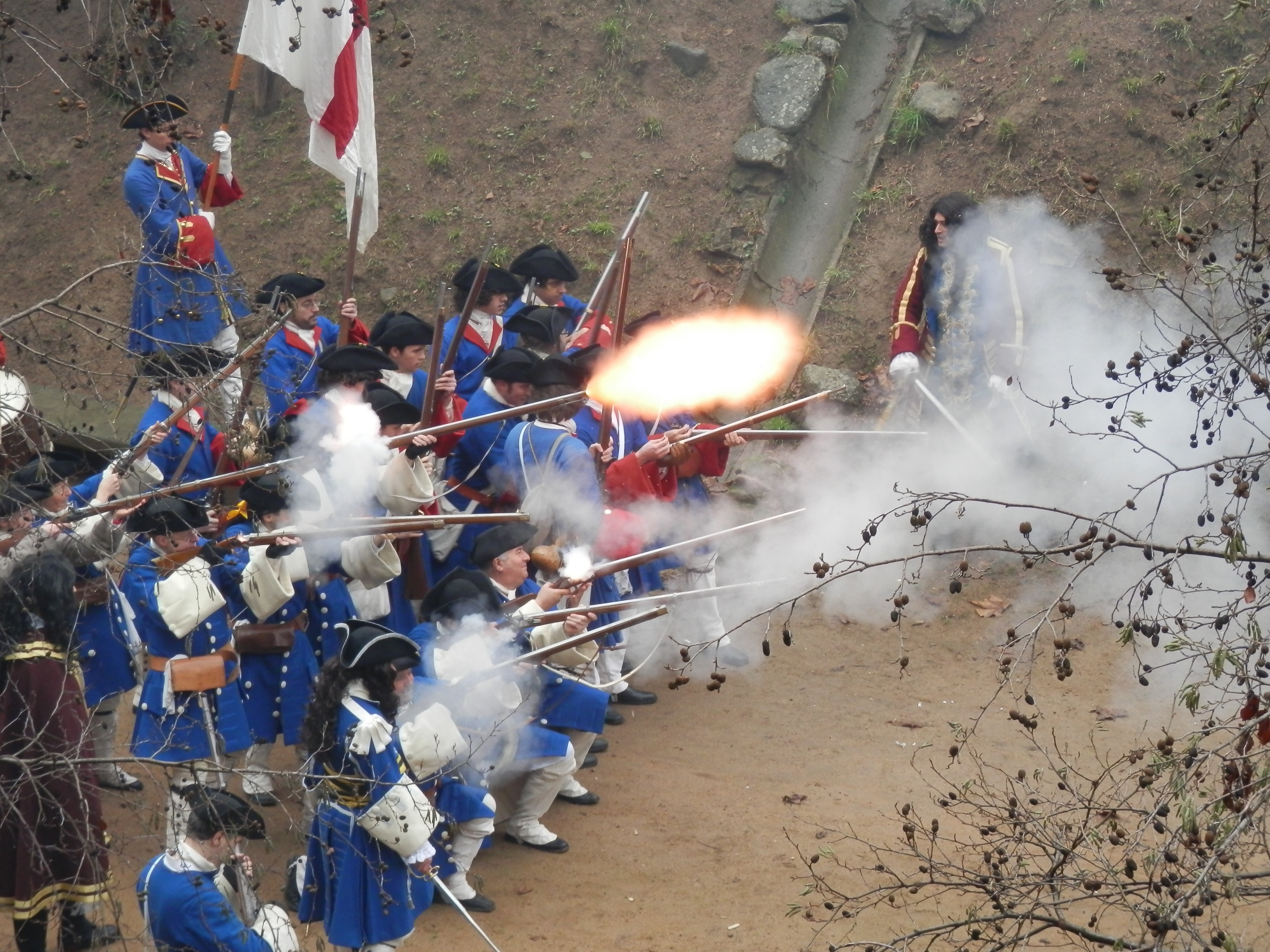 Fotografia de la recreació del Combat d'Arbúcies de 2014, a la imatge s'hi pot veure una renglera de soldats (Miquelets de Catalunya) disparant.